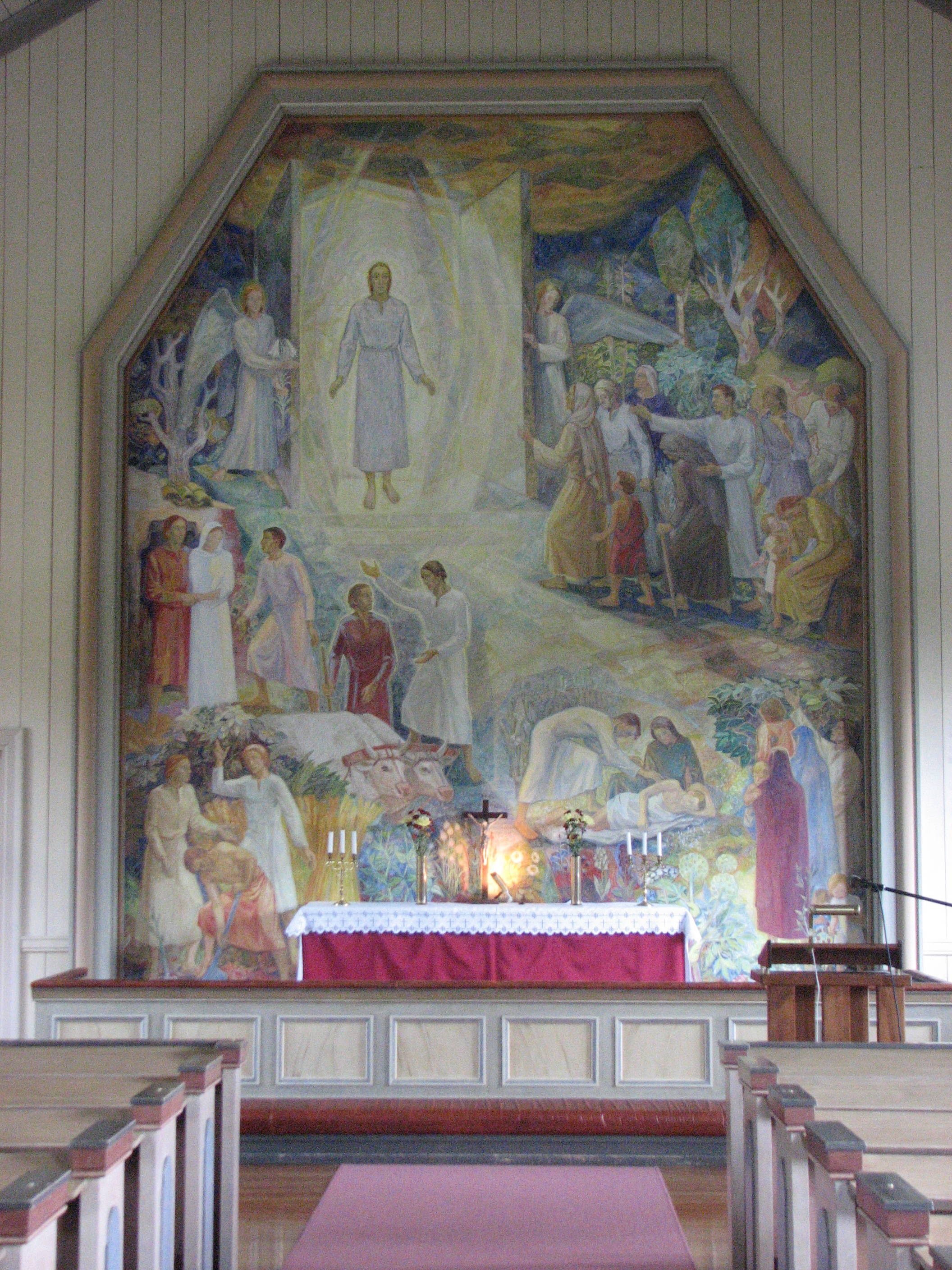 Tärna kyrka, Luleå, Sweden 2011